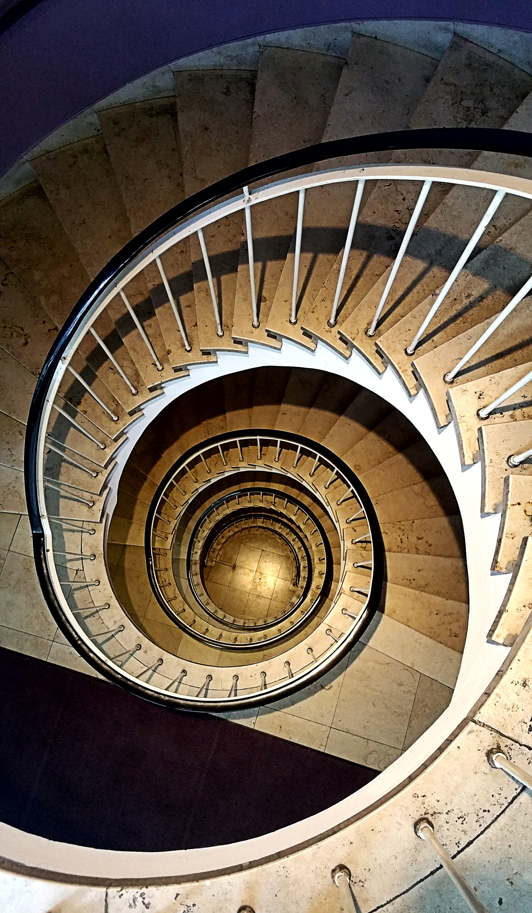 Deutschland, Bayern, Oberbayern, München, Altstadt, Marienplatz, Wendeltreppe zum Cafe Glockenspiel